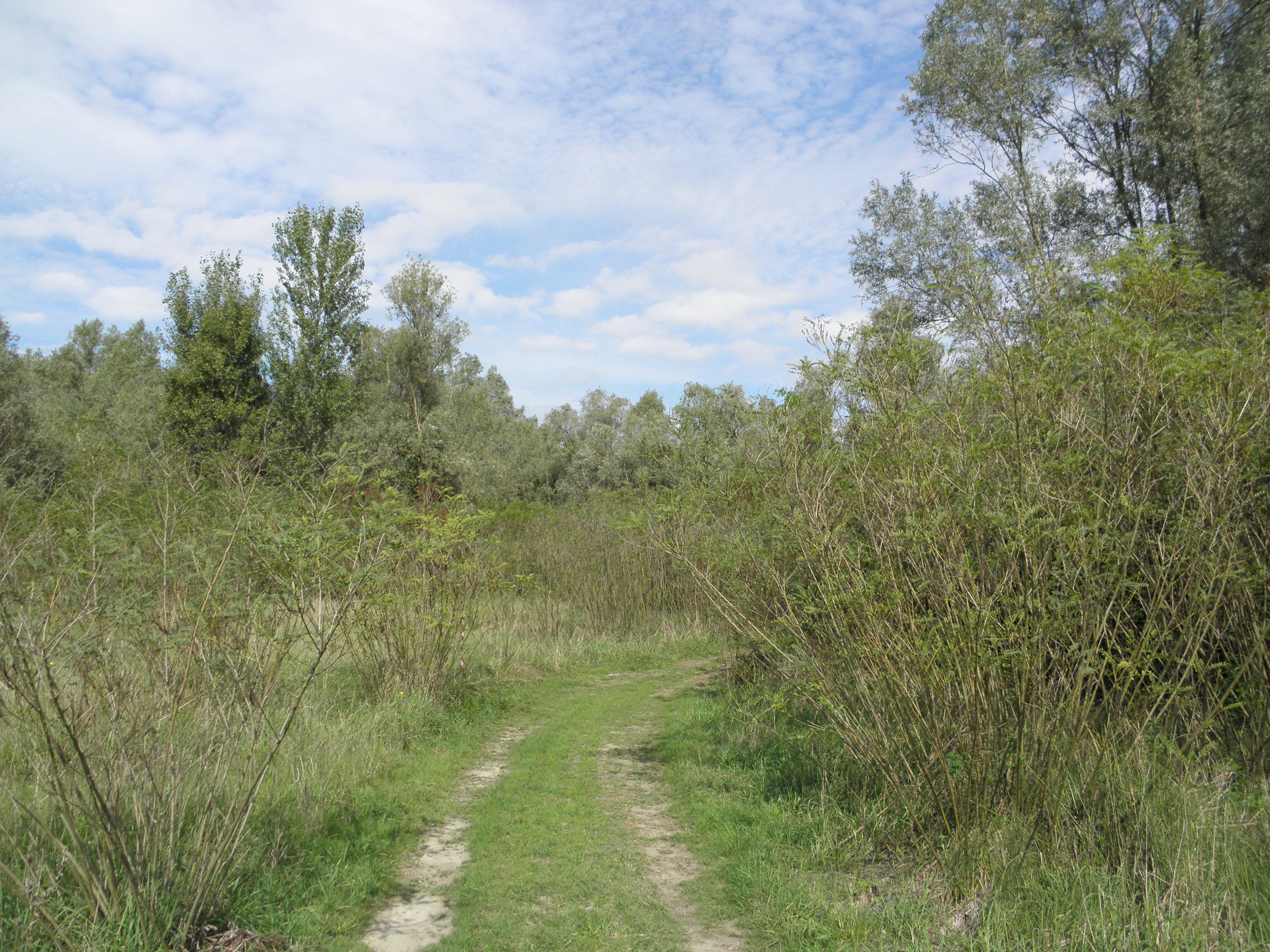 Panarella, frazione di Papozze: uno dei sentieri di ingresso all'oasi Golena di Panarella, area protetta WWF.